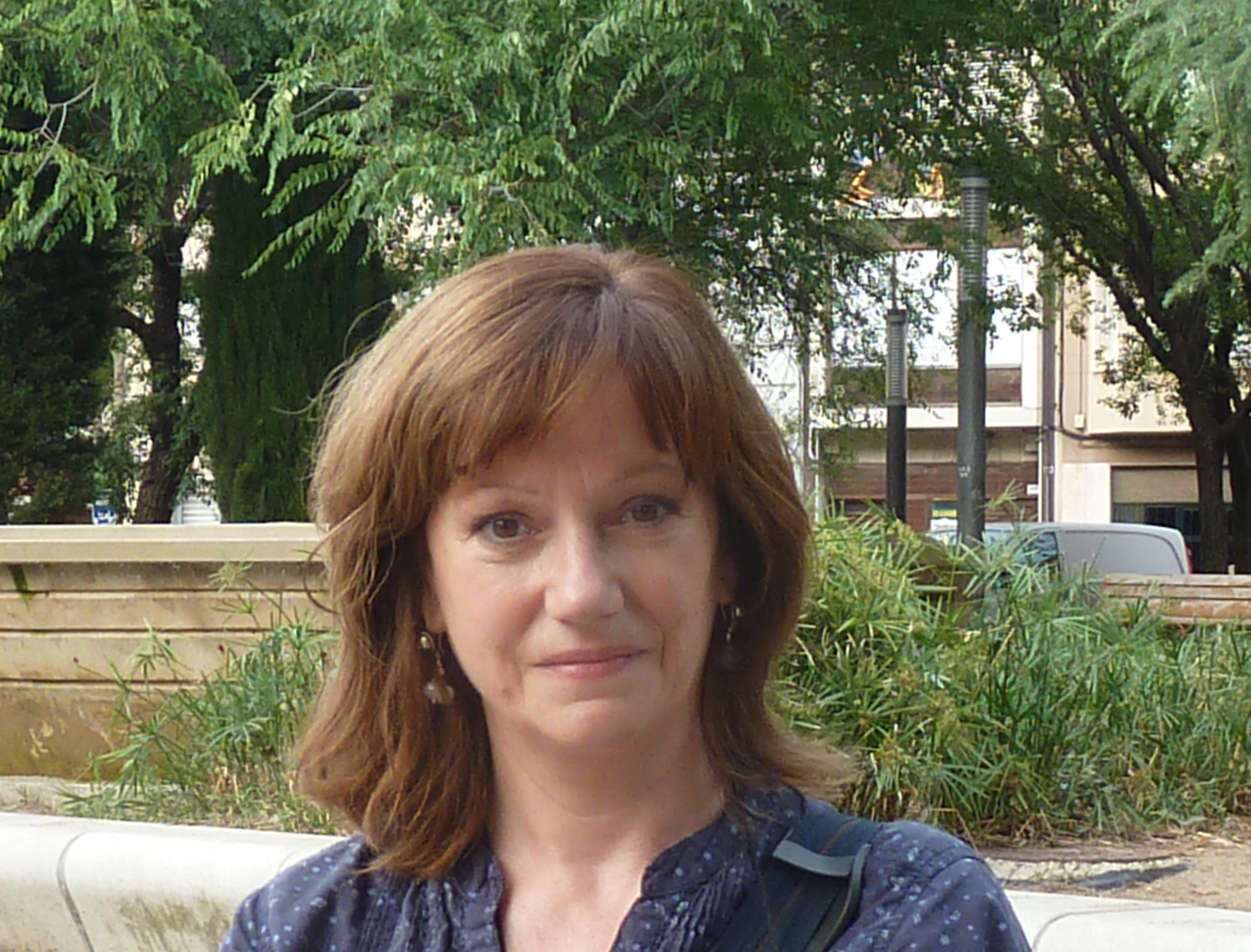 Rosa Renom a la plaça Marcet de Sabadell